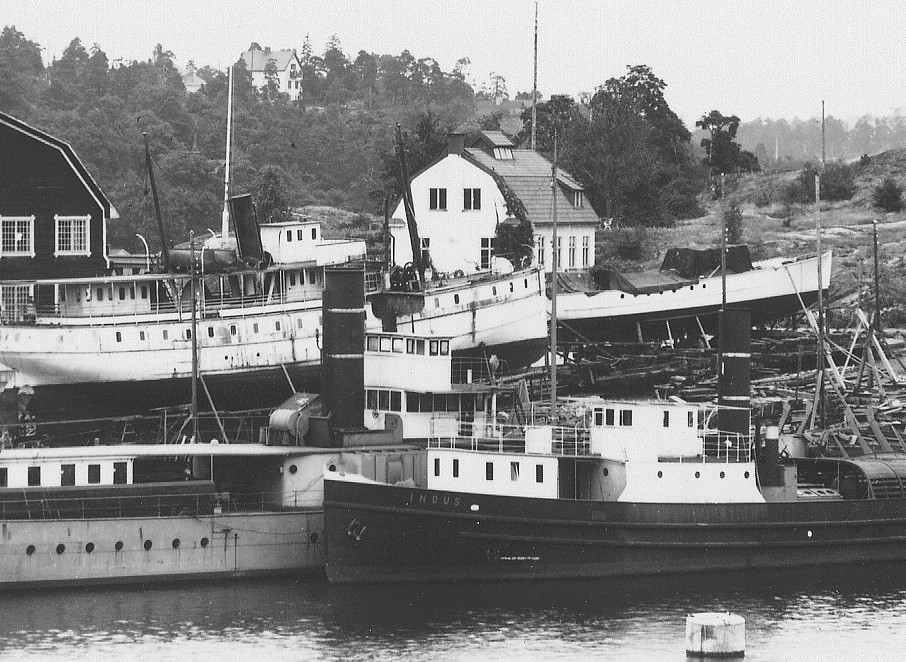 Ekensbergs varv med f.d. Ekensbergs wärdshus